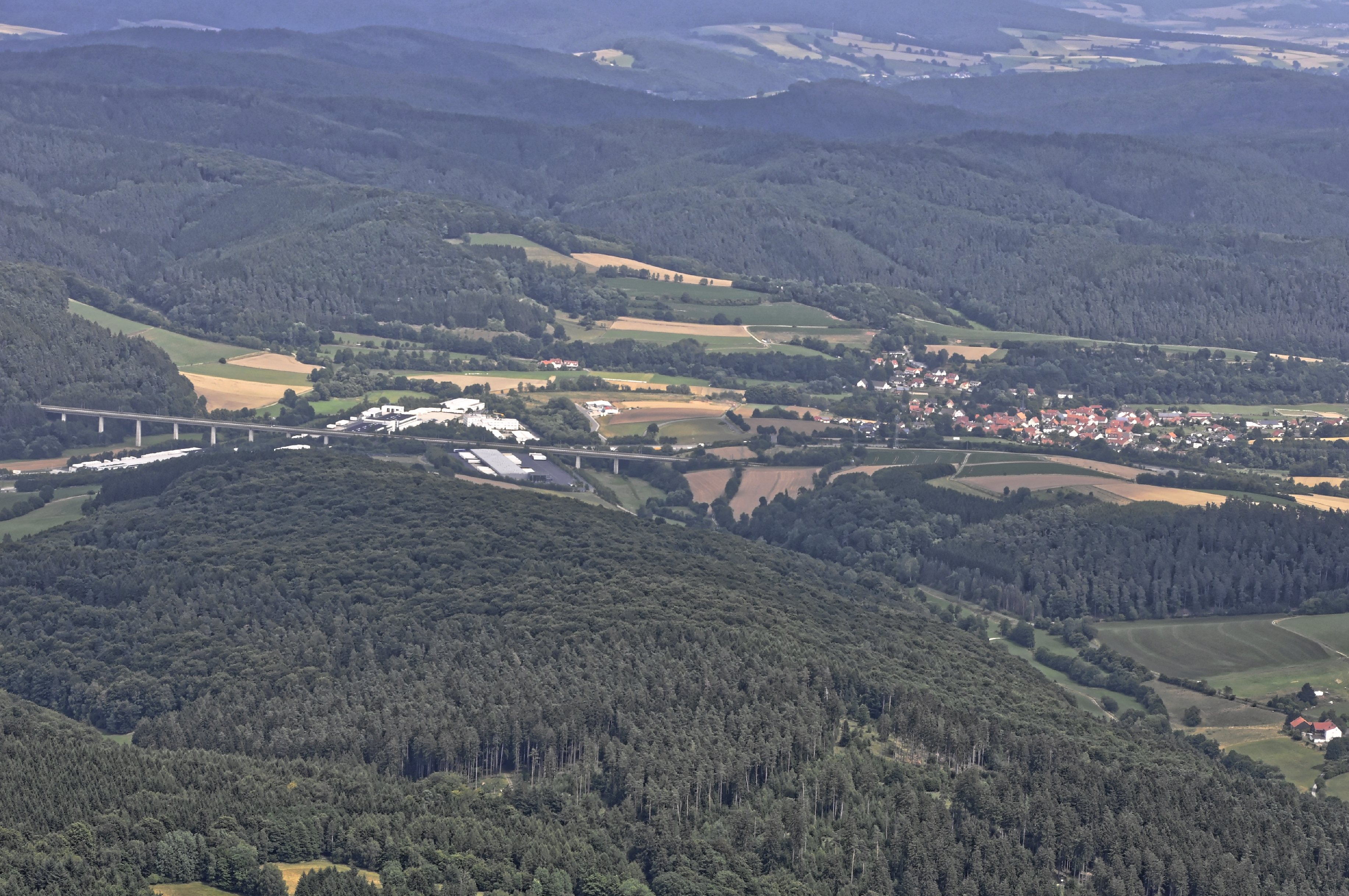 Bilder vom Flug Nordholz-Hammelburg 2015: Die Geisbachtalbrücke der ICE-Schnellfahrstrecke Hannover–Würzburg über die Autobahn A 7 und die Bundesstraße B 324. Rechts Obergeis.